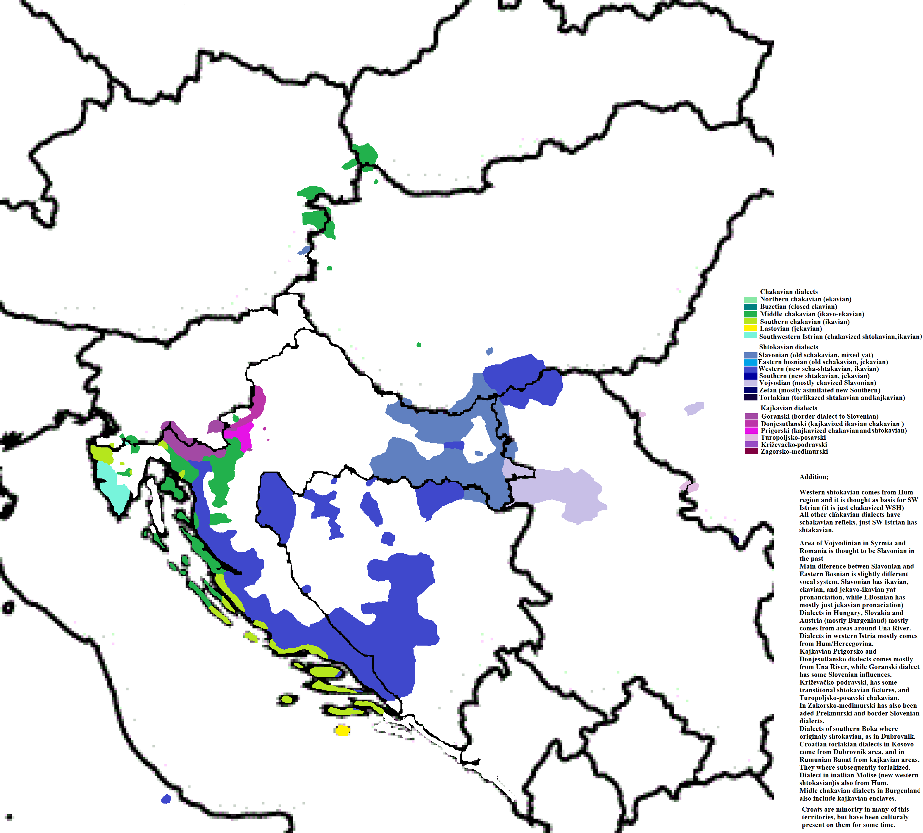 Ikavski i poluikavski te povezani dijalekti; Novoštokavski ikavski, slavonski (kao i novoštokavizirani i torlakizirani slavonski na istoku), južnočakavski i jugozapadni istarski te jekavski lastovki ekavo-ikavski srednječakavski donjesutlanski (kajkavizirazni južnočakavski) i prigorski (kajkavsko-srednječakavski mix), kao i goranski